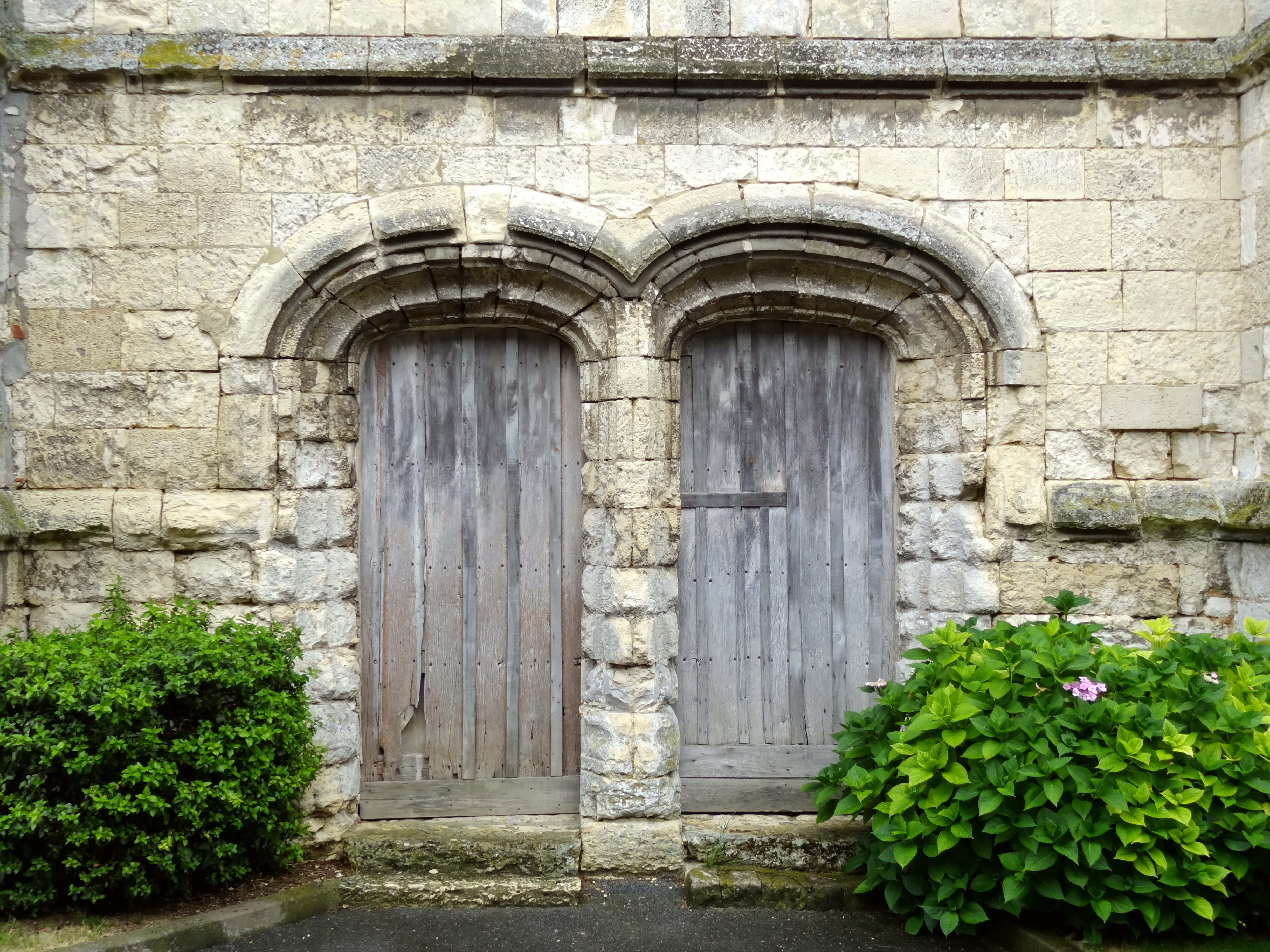 Église Saint-Martin de Maimbeville - voir titre.